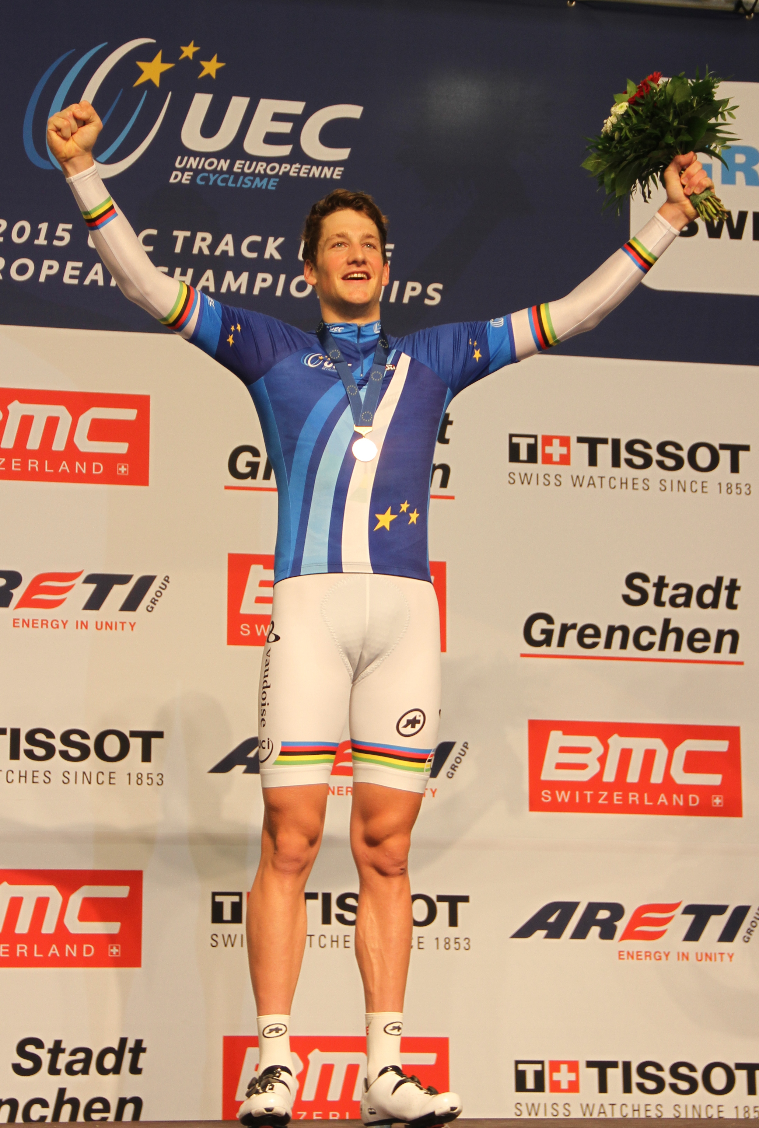 Stefan Küng, Schweizer Radsportler, Europameister in der Einerverfolgung The making of this document was supported by the Community-Budget of Wikimedia Germany.